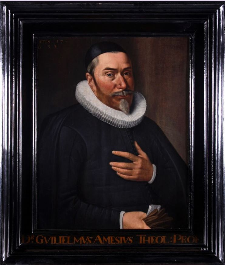 Portret in olieverf van Gulielmus Amesius ( William Ames), professor in de godgeleerdheid aan de Franeker universiteit van 1622 tot 1633. Gulielmus Amesius (William Ames) (Ipswich 1576 - Rotterdam 14 november 1633). In Franeker werd hij benoemd tot hoogleraar theologie. (tekst: Museum Martena)